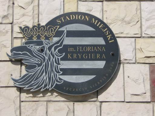 Tablica Stadionu Miejskiego im. Floriana Krygiera w Szczecinie przy głównym wejściu od ul. Twardowskiego